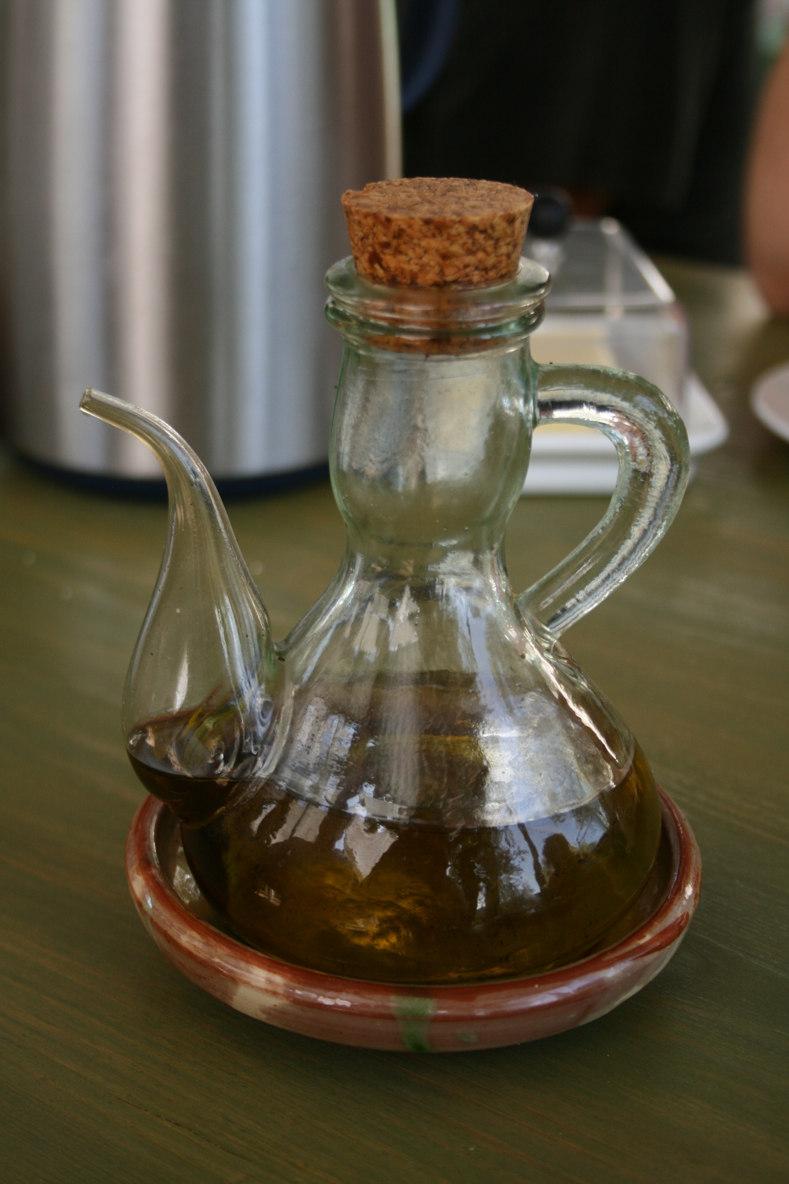 Aceitera típica de España